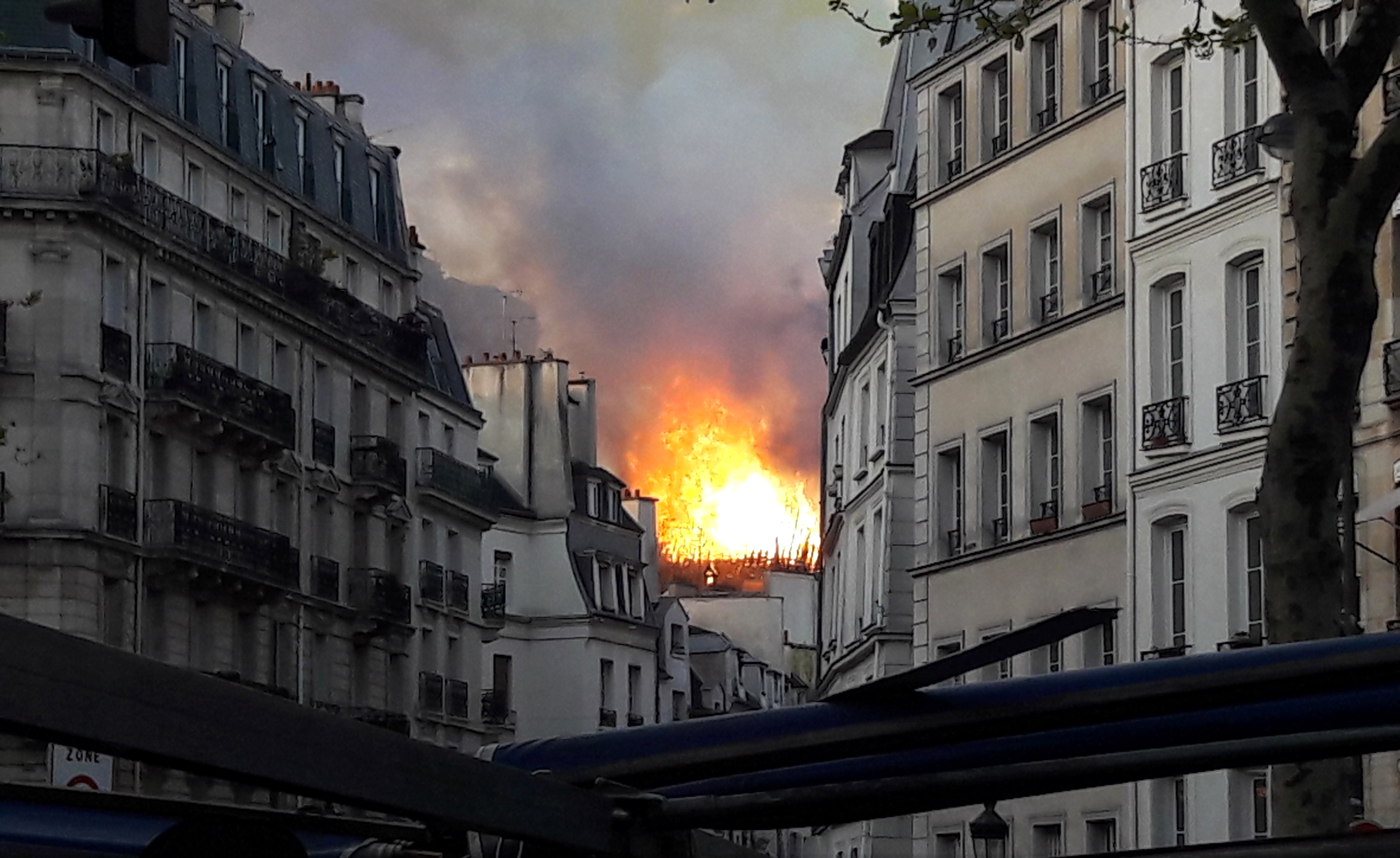 Incendie Notre-Dame de Paris. Toiture en feu, vue depuis le boulevard Saint-Germain